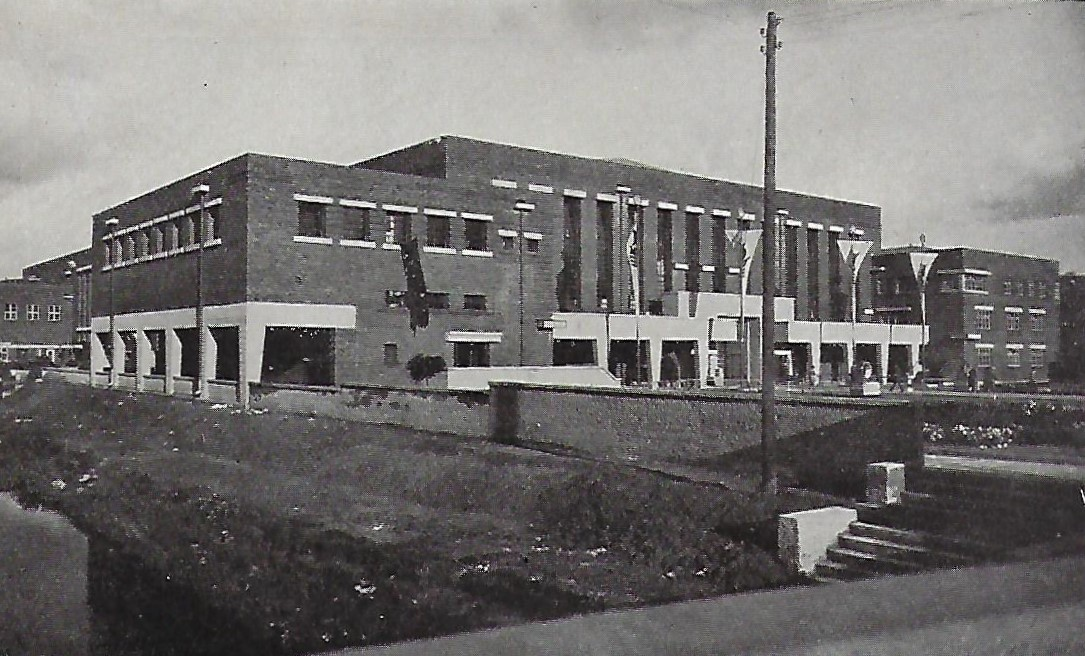 Neubau des Hauses der Technik in Königsberg